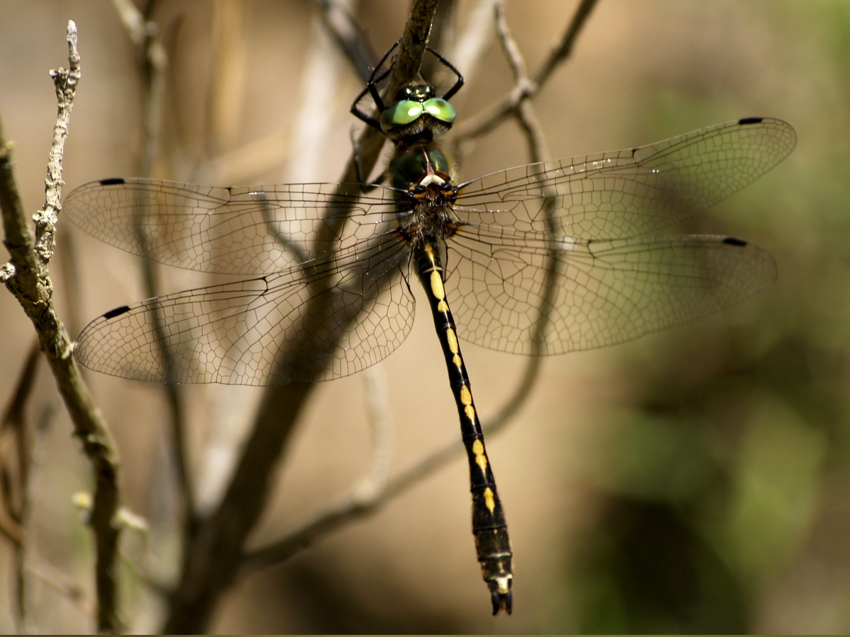 Oxygastra curtisii mascle